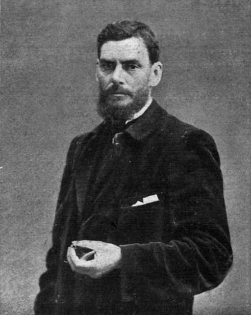 Fotografía de Joseph Llimona, obra de Pablo Audouard.